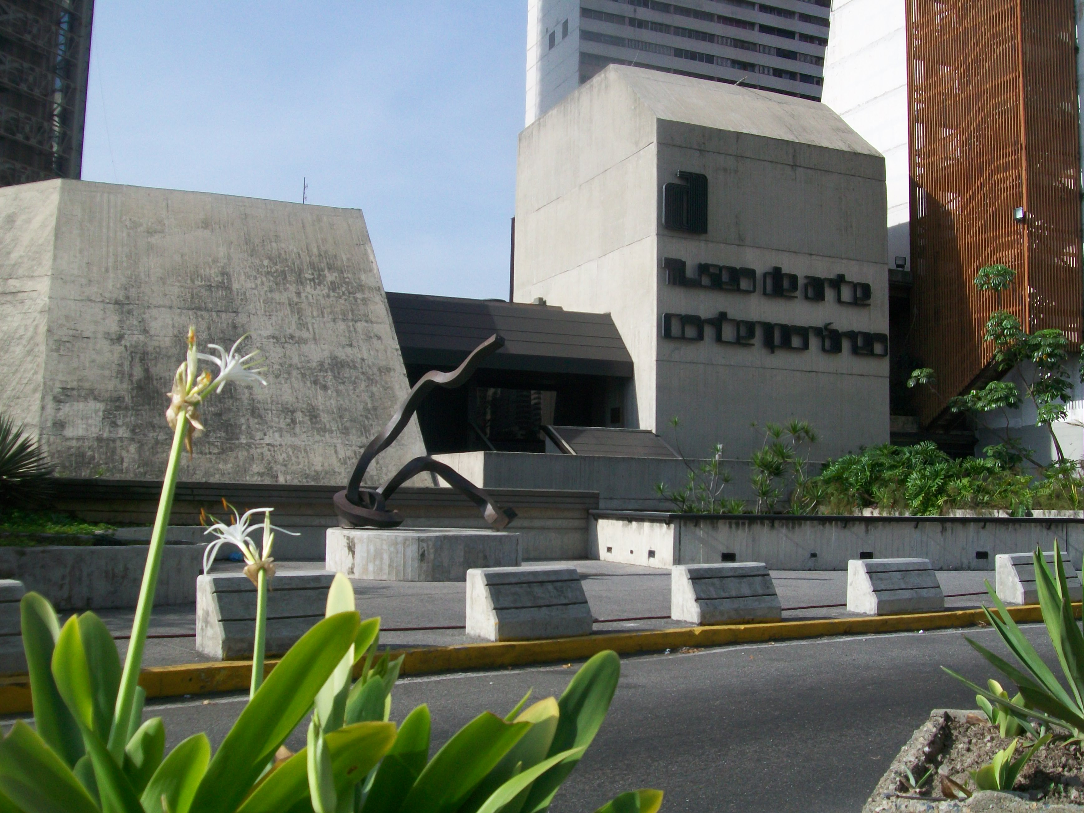 Fachada principal del Museo de Arte Contemporáneo de Caracas, Venezuela.